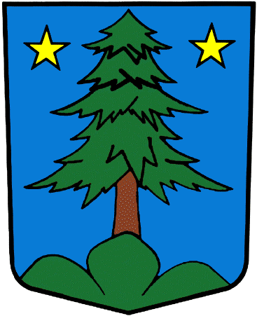 Wappen von Saint-Léonard Kanton Wallis